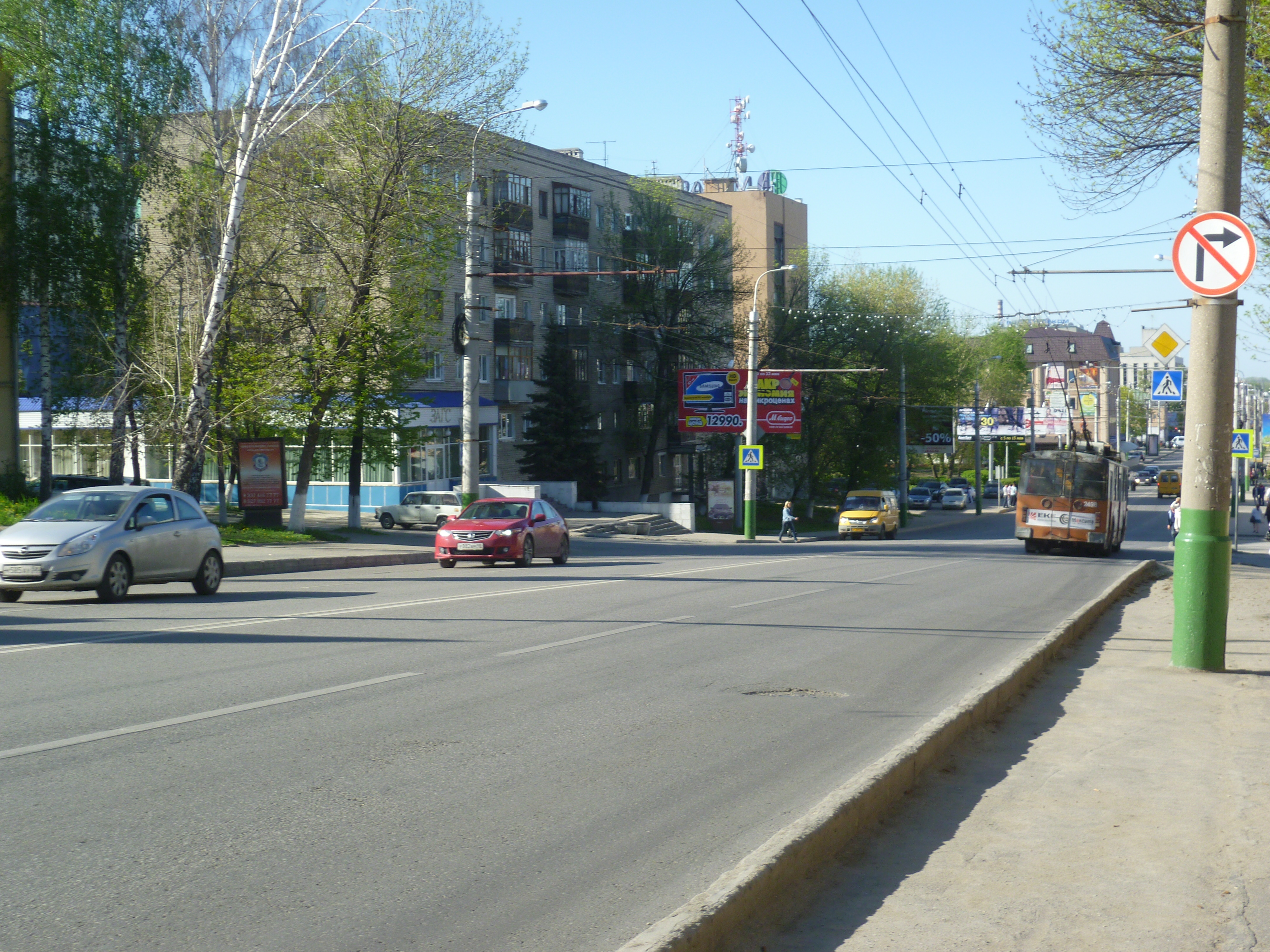 Улица Кирова г. Пензы рядом с Троицким женским монастырём